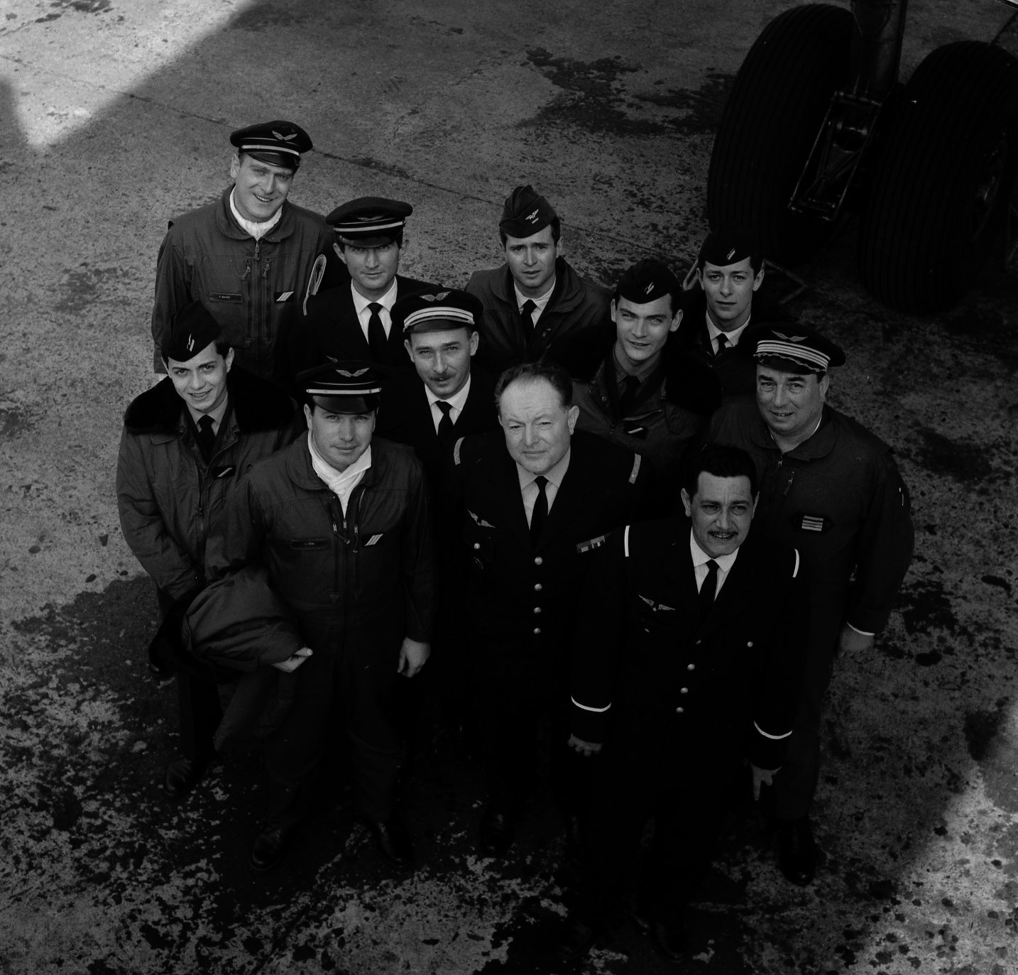 Base aérienne 101 de Toulouse-Francazal. 12 mars 1964. Photo de groupe : vue d'ensemble en plongée des officiers de l'Escadron Aérien de Recherches et de Sauvetages n°99 (EARS 99), les hommes regardent en l'air en direction du photographe.